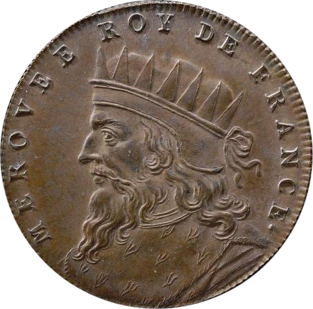 Auteur Dassier, Jean (1676-1763 ; médailleur) Titre : Médaille Publication [Paris], [ca 1720] Description : bronze ; 31 mm ; 15,37 g Licence GPL et GFDL Notes Acq. 95-0632 Cote : BNF Richelieu Monnaies, médailles etantiques exemplaire unique L'ensemble est conservé dans deux boîtes cylindriques en buis. Tranche cannelée. Identifiant 07700003 Détail du contenu : No d'image 1 Titre Mérovée roy de France Notes 1720 Sujet(s) Mérovée (vers 448-vers 457 ; roi des Francs) Modifié par Rinaldum 11 jan 2004 à 21:30 (CET) Image trouvé sur le site Gallica de la BNF